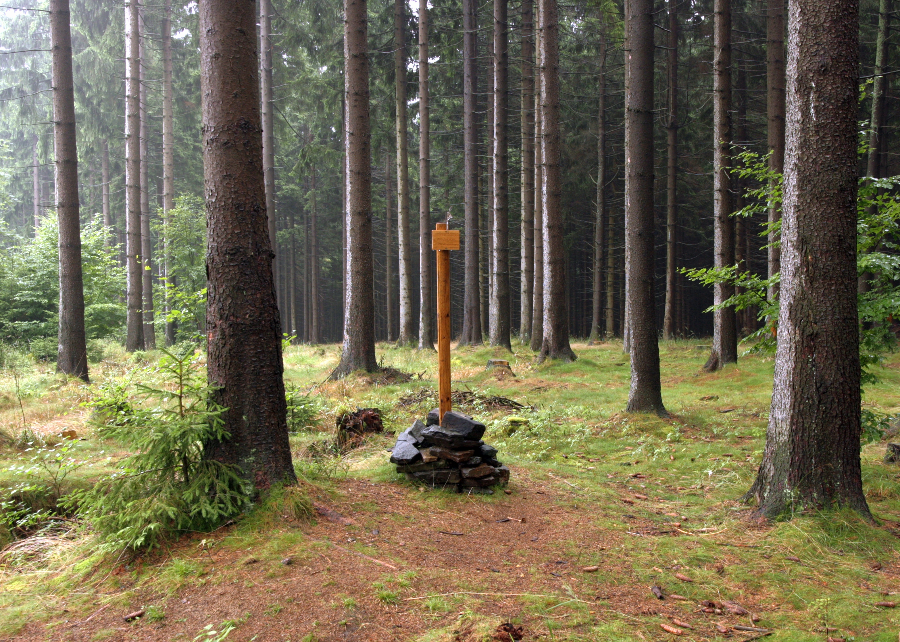 Cikháj - Fryšavský kopec, vrchol se značkou.